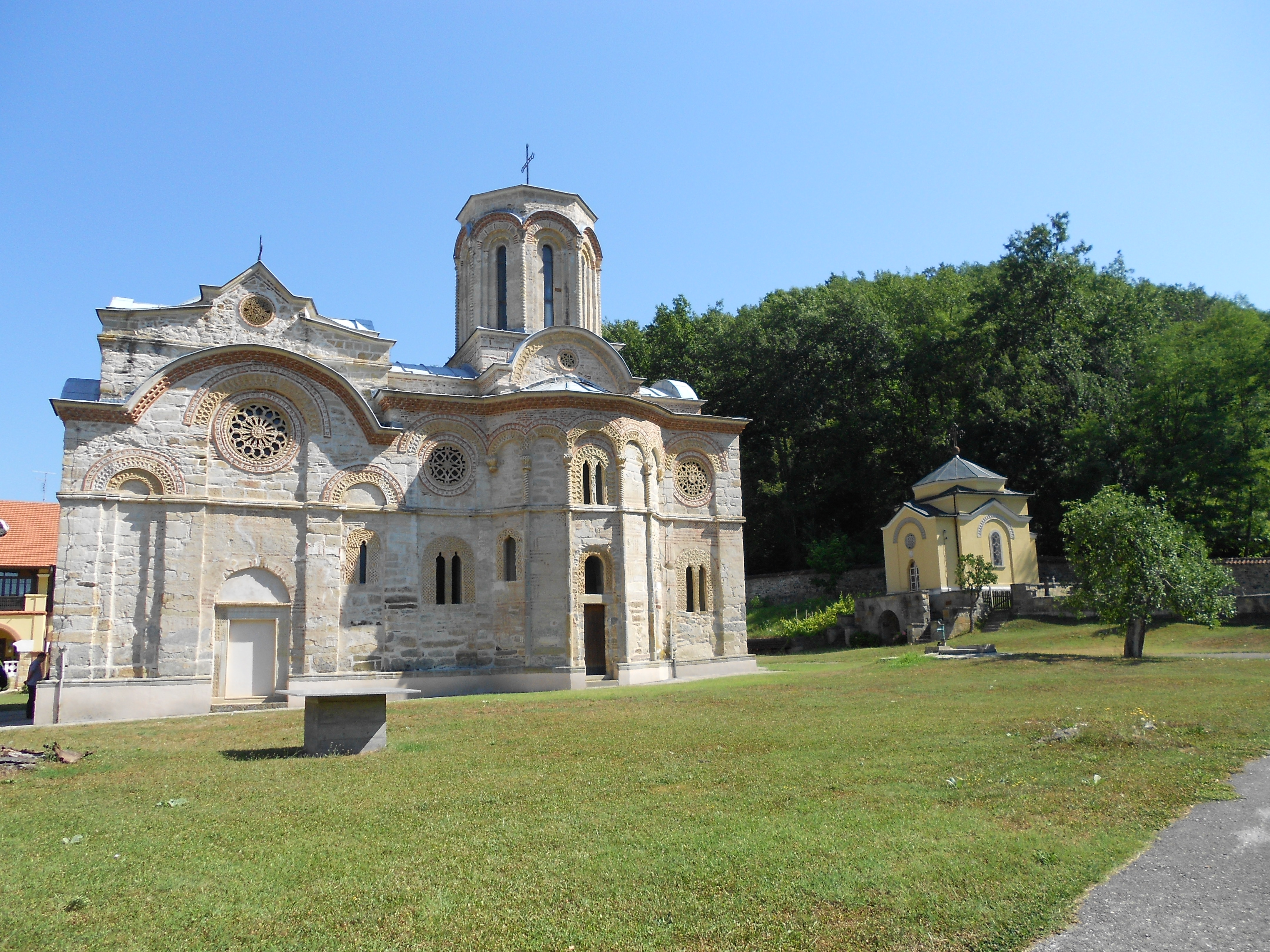 Manastir Ljubostinja pokraj Trstenika.